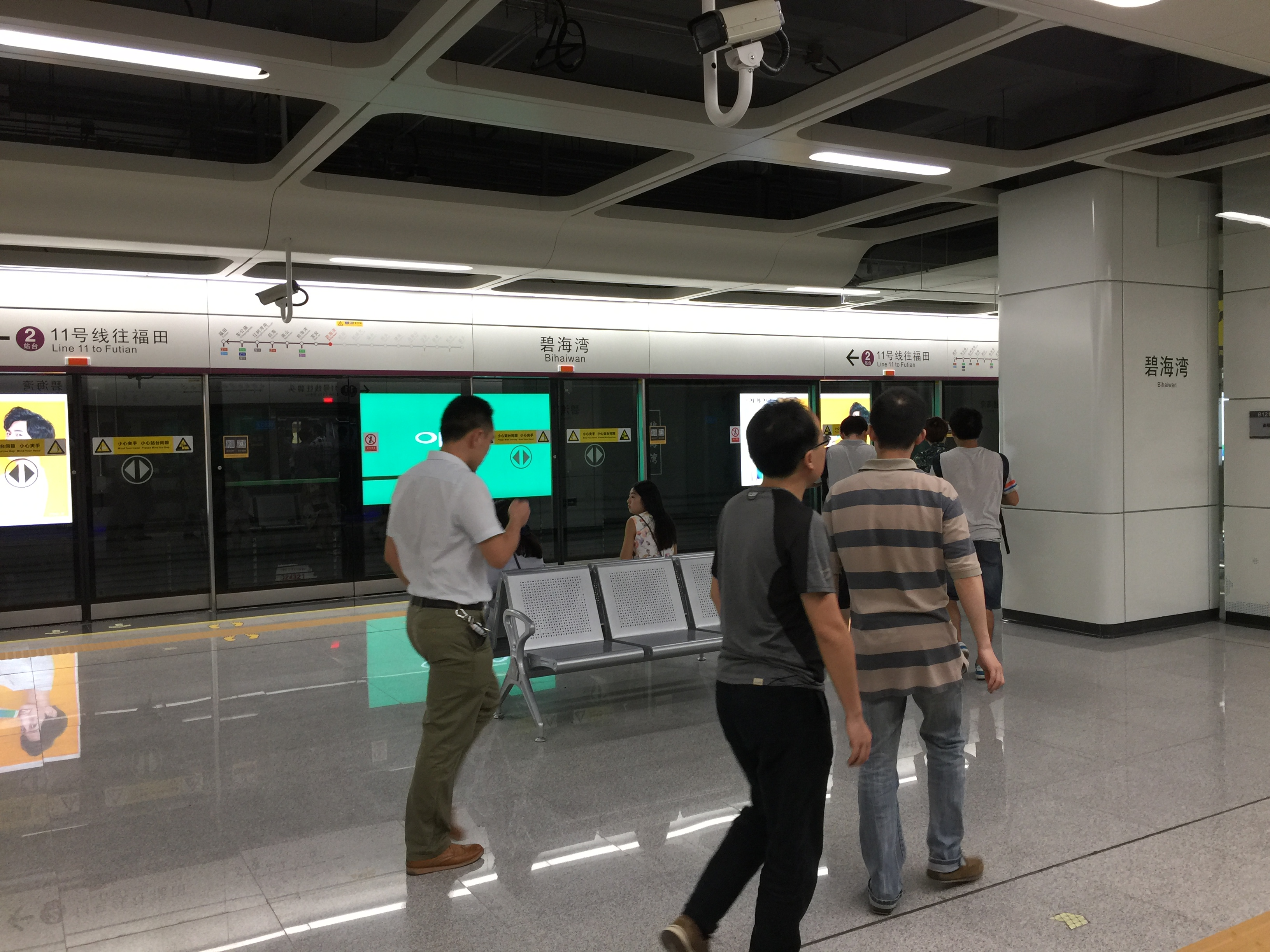 Shenzhen Metro Line 11